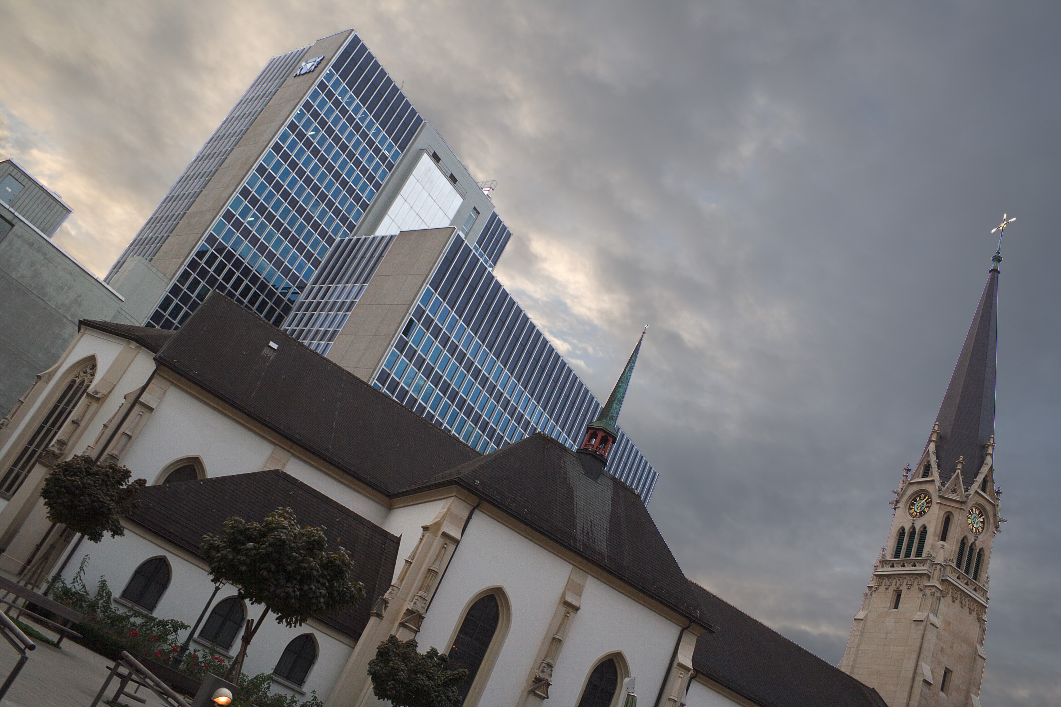 Kirche St. Peter und Paul mit Werdhochhaus im Hintergrund, Zürich, Schweiz Der dramatische Eindruck entsteht durch Montage von einem auf zwei Arten entwickelten .raw-File.